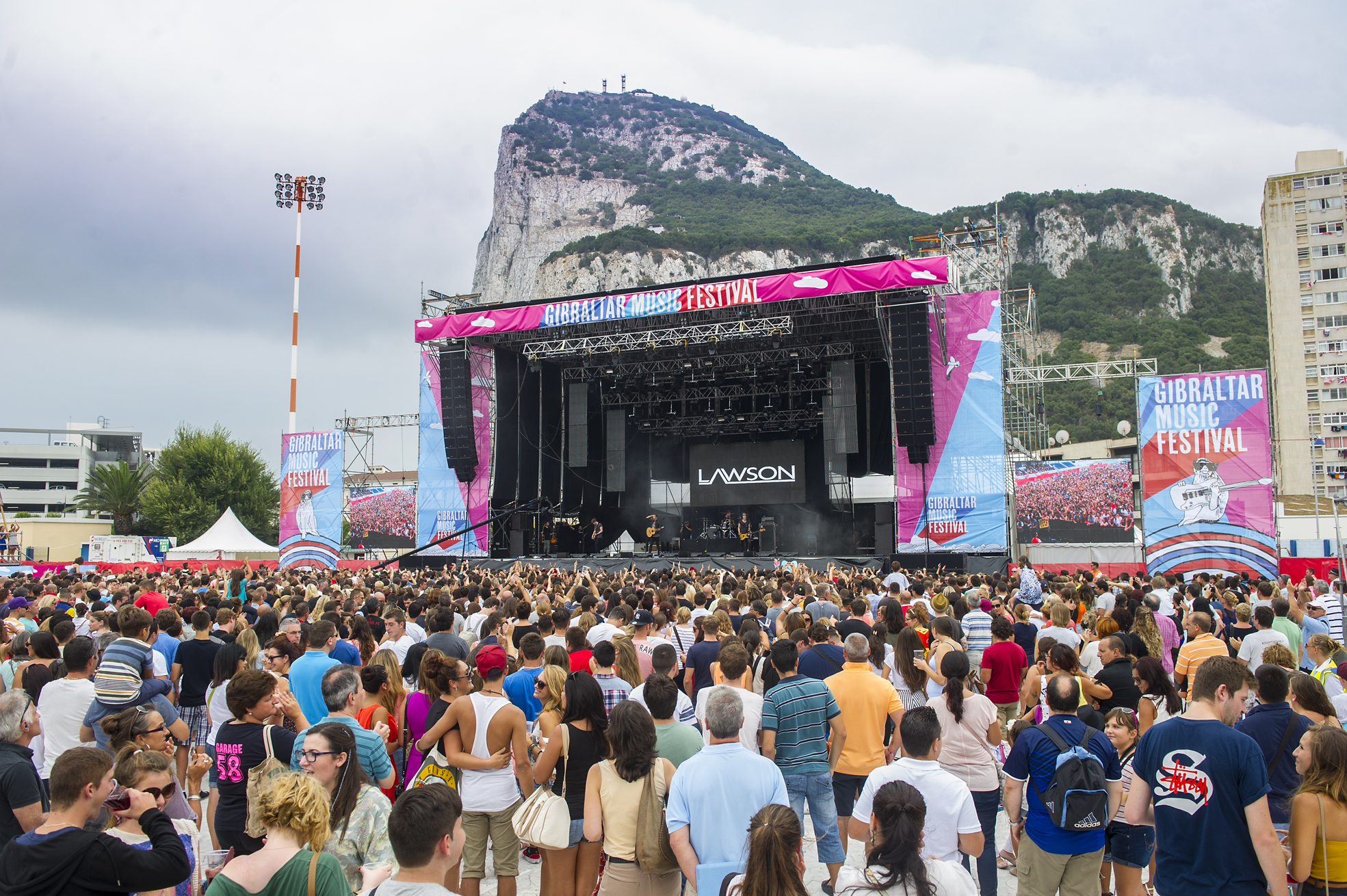 GIBRALTAR MUSIC FESTIVAL 2013 - PUBLICO Y AMBIENTE